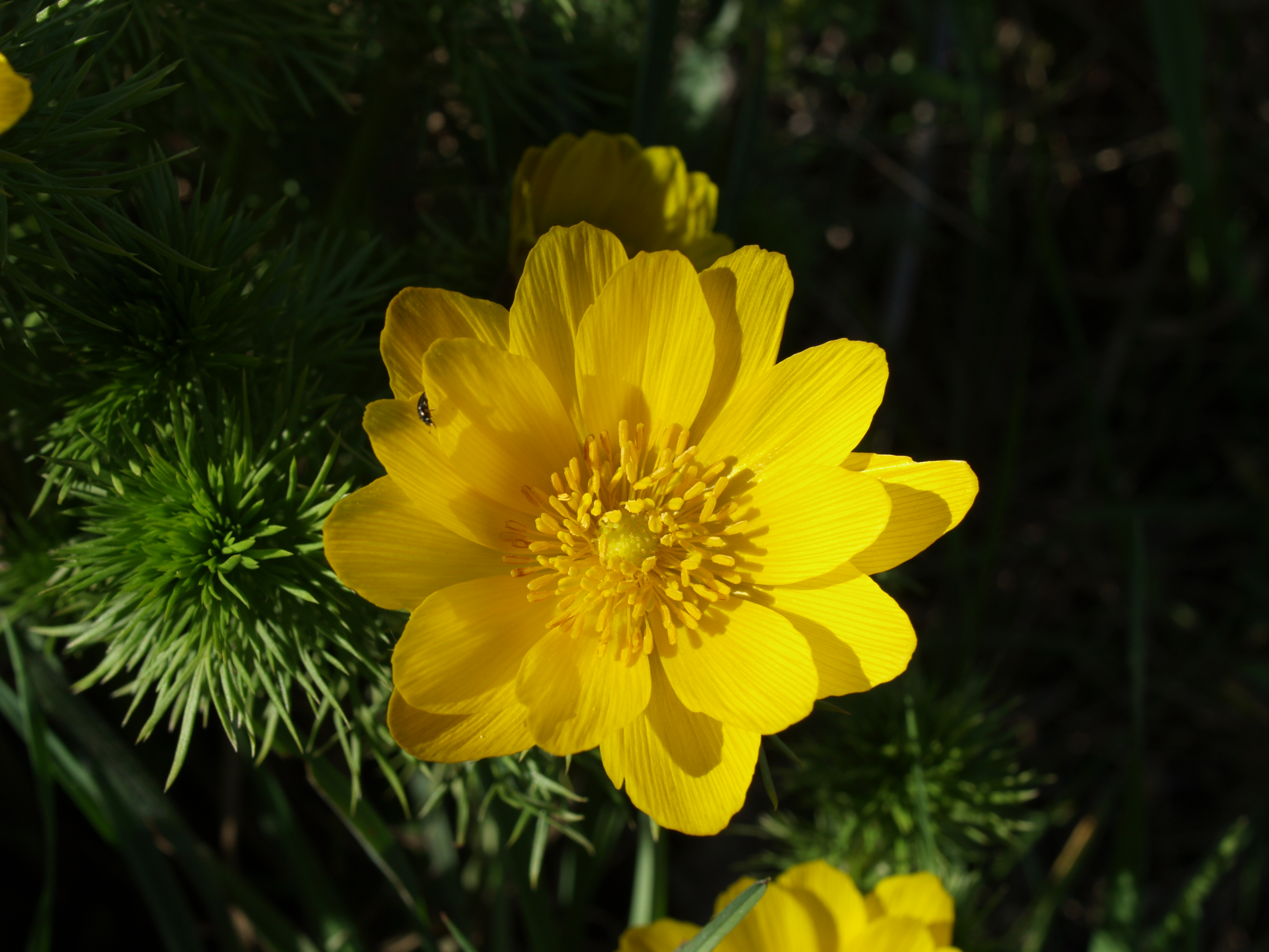 Špidláky (přírodní rezervace) - brzké jaro - Adonis vernalis L., hlaváček jarní - status ohrožení v ČR: C2 (silně ohrožený)